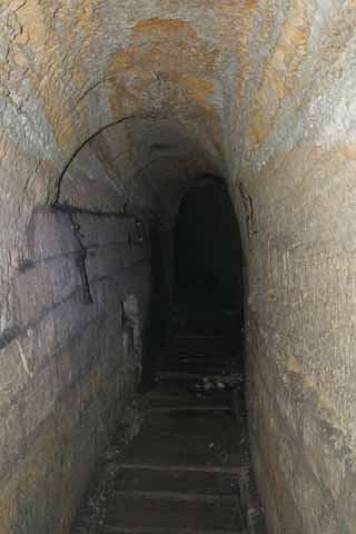 Odessa catacombs